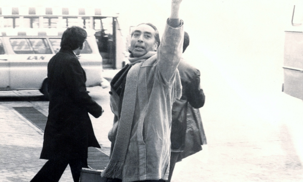 El político comunista chileno Ernesto Araneda al salir del exilio